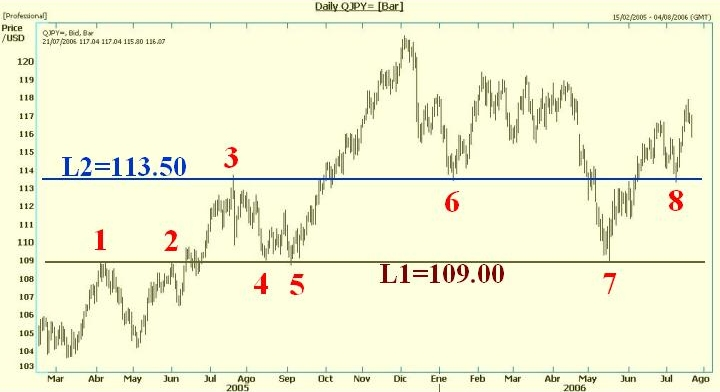 Description: gráfica de cambio de roles de soporte-resistencia yen diaria(double top) Source: Trabajo propio Author: LCB Date: Julio 21, 2006 Authorization: Dominio Público